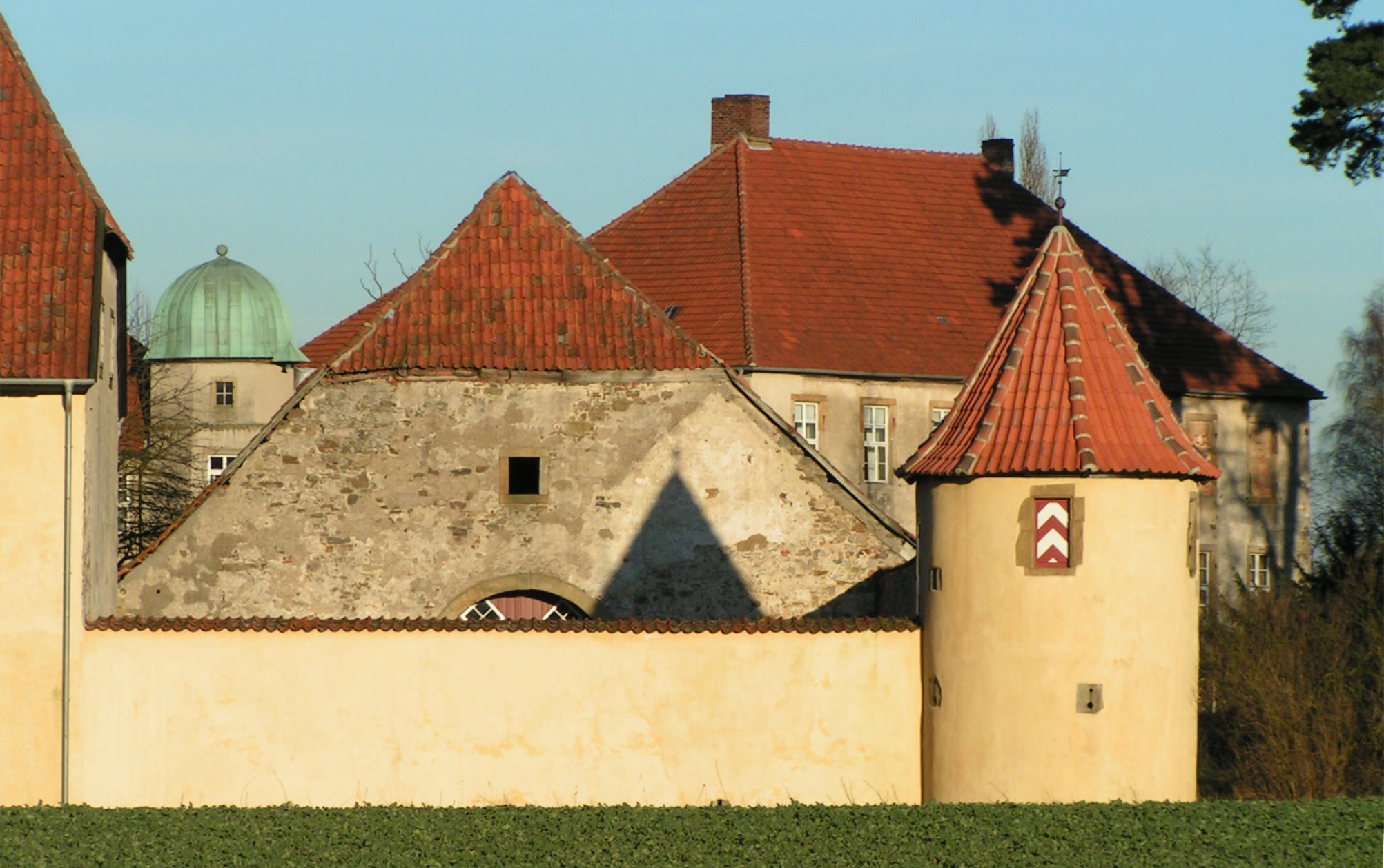 Schloss Hünnefeld: Mauer und Türme